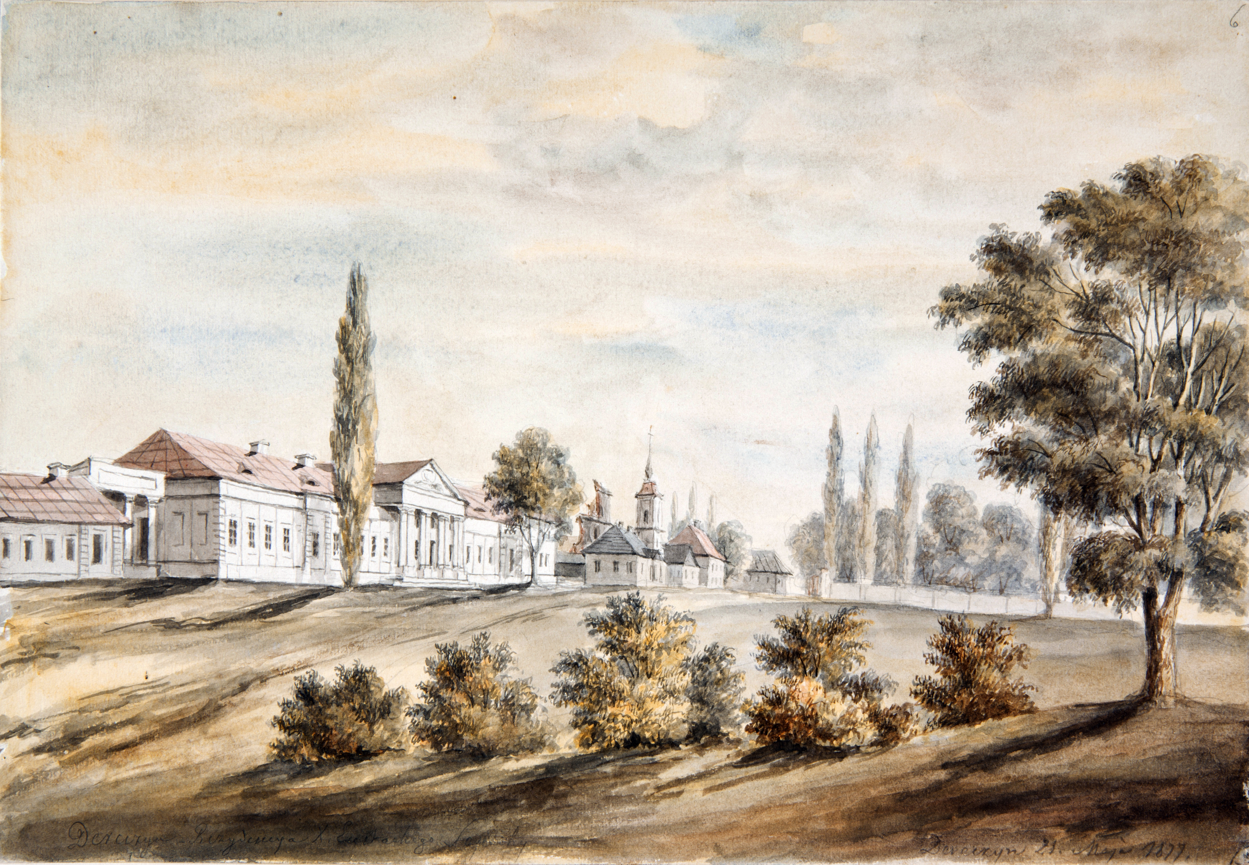 Беларуская (тарашкевіца): Дзярэчын (Dziarečyn), палац Сапегаў (Sapieha)